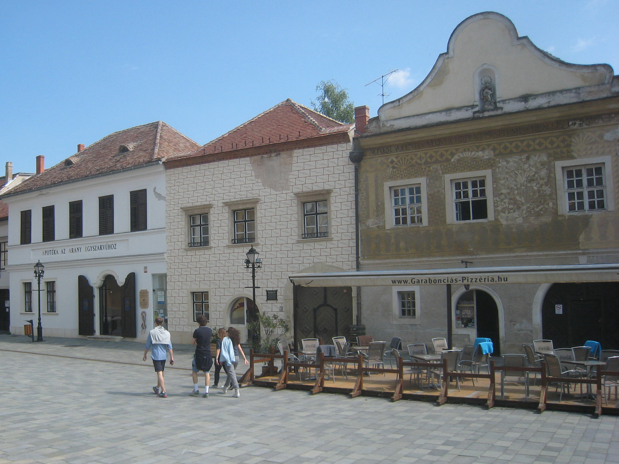 Kiseg, Jurišičev trg; na levi je zgodovinska lekarna, na desni hiša s fasado v tehniki sgraffito.